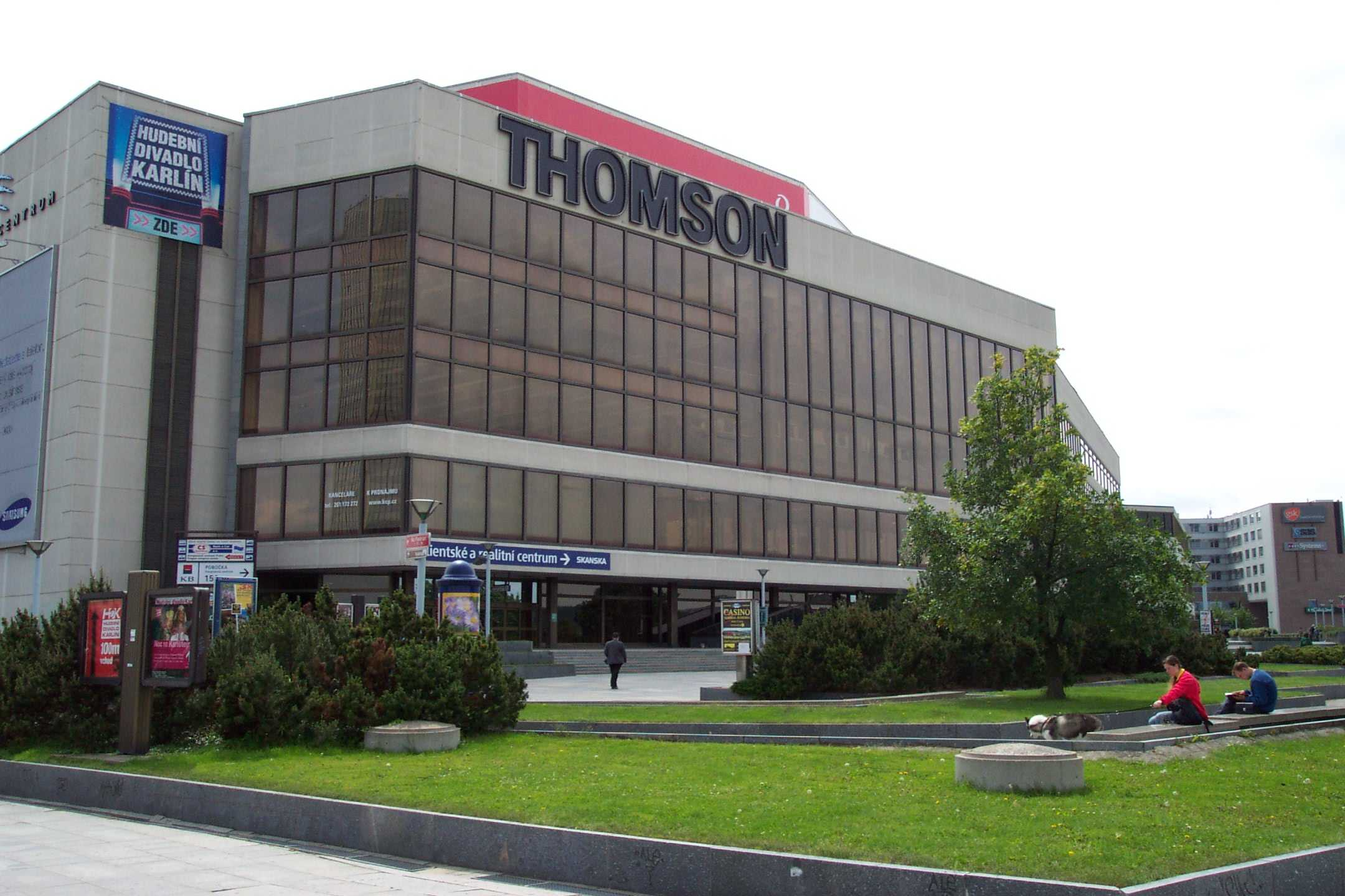 Prague congress center - Pražské kongresové centrum